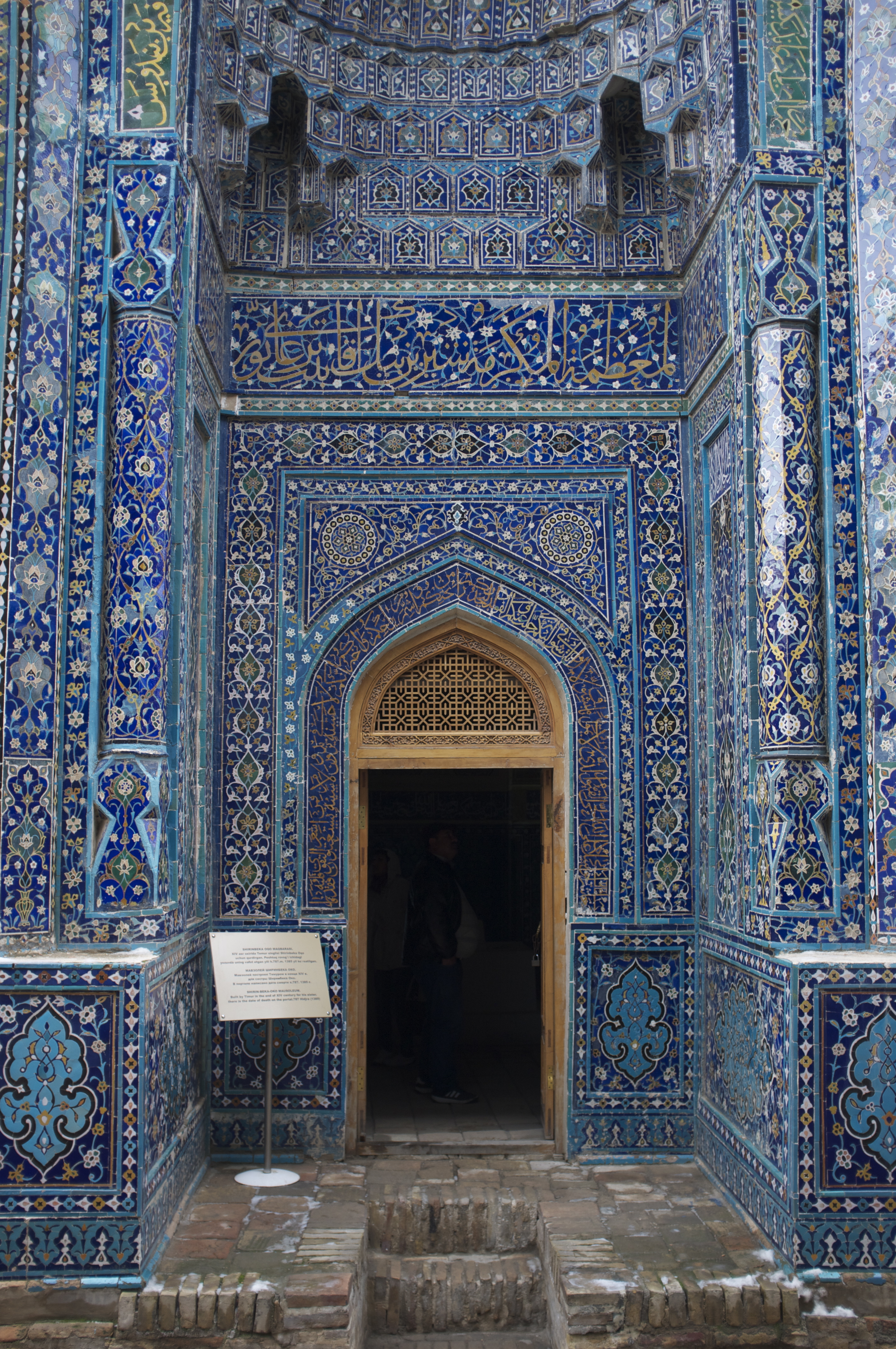 Shah-i-Zinda, Samarkand